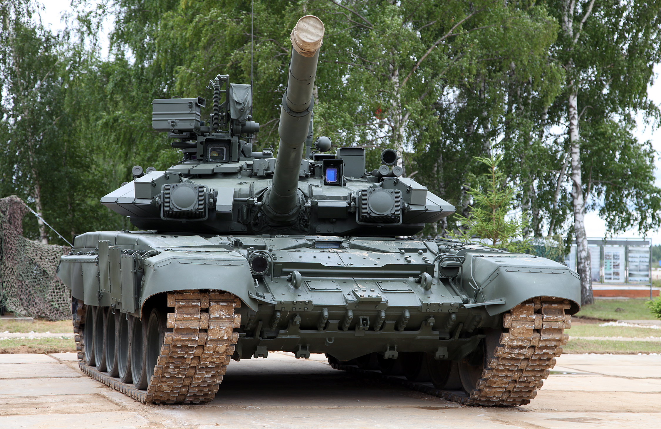 Т-90A